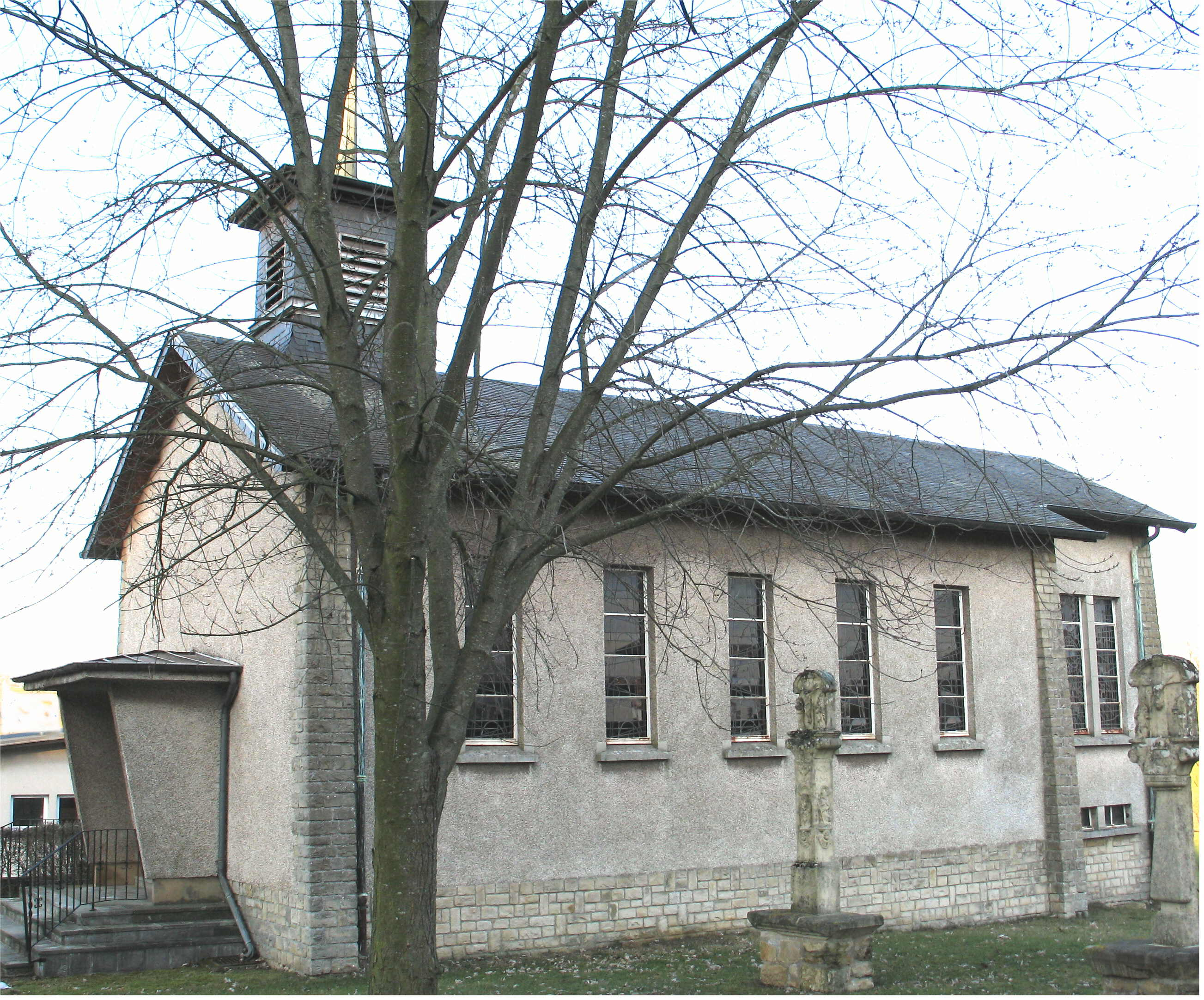 Sujet : D'Kapell zu HÃ©iweng Source : Eege Foto lb: :lb :User : Johnny Chicago Lizenz : GFDL